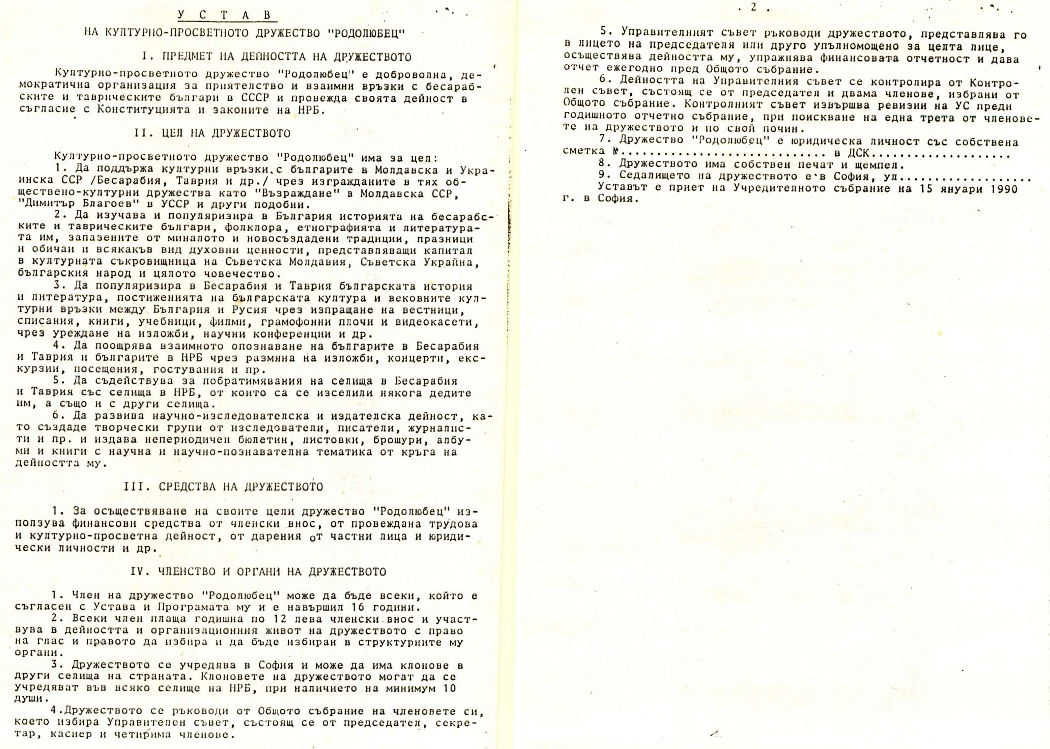 Устав на Културно-просветното дружество за връзки с бесарабските и таврийските българи "Родолюбец" 1990 г.